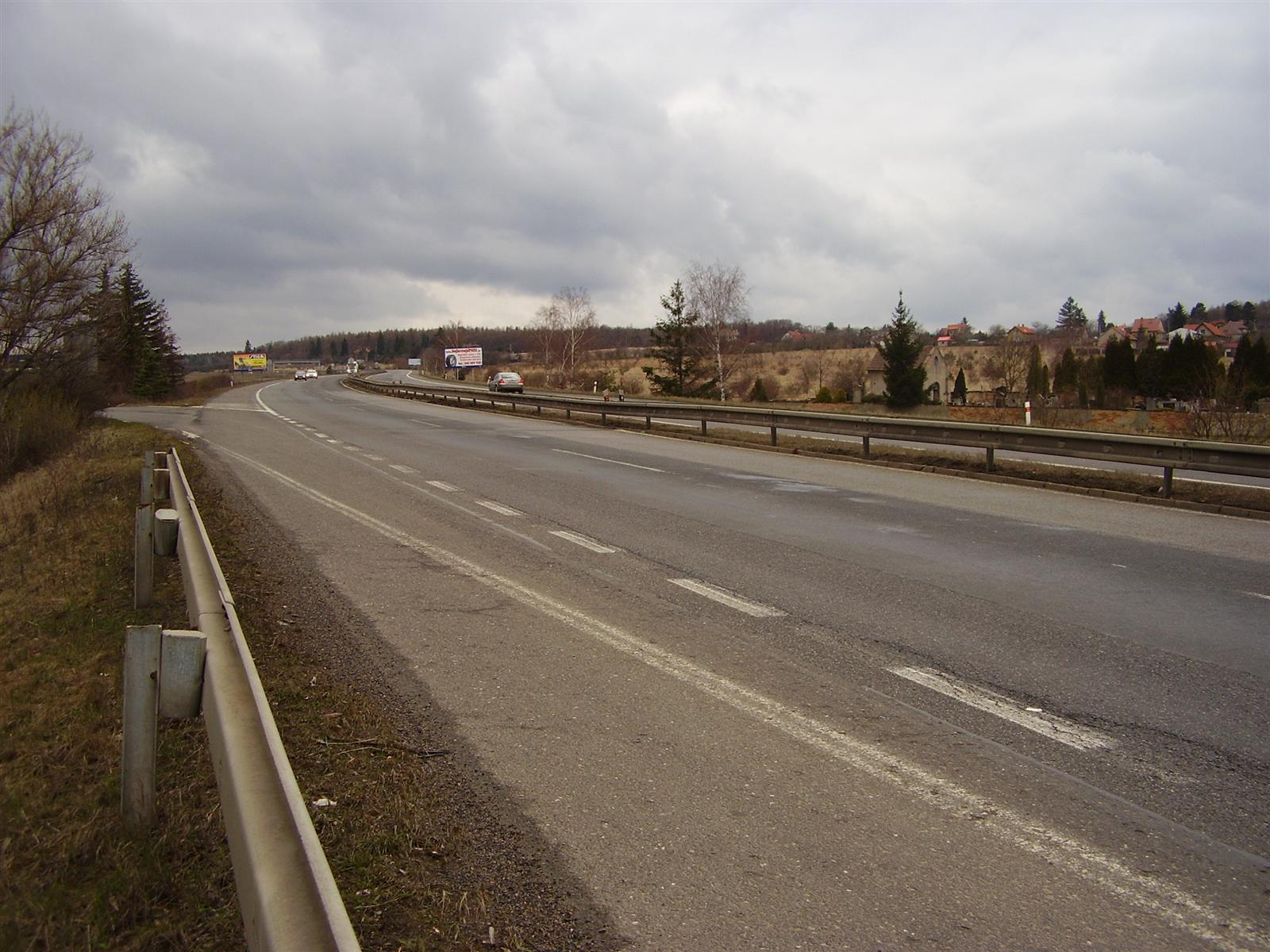 Rychlostní slilnice R4 u Mníšku pod Brdy